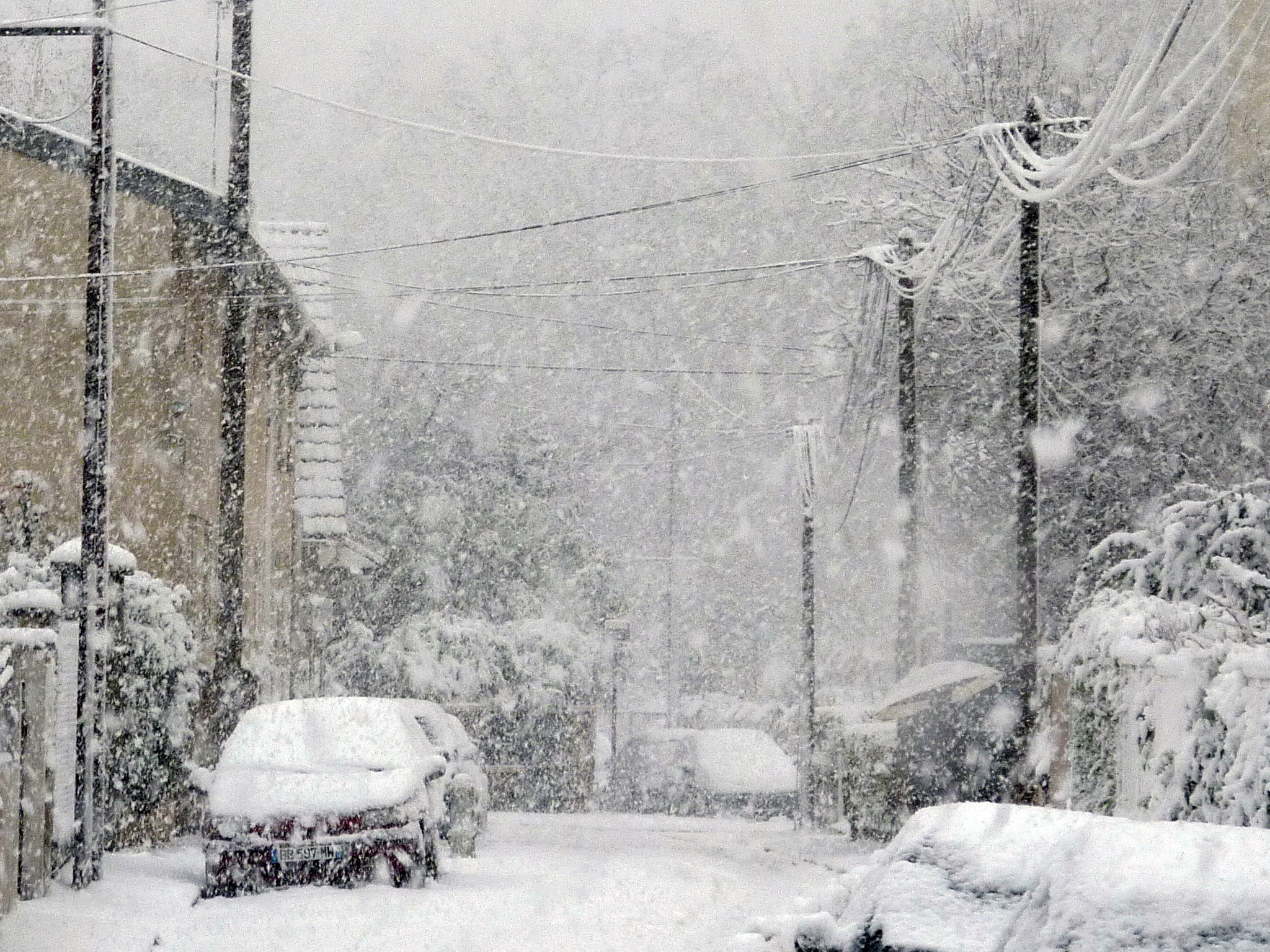 Neige à Livry-Gargan en décembre 2010